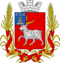 Проект герба Козлова